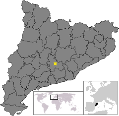 Localització d'Igualada. Location of Igualada in Catalonia.